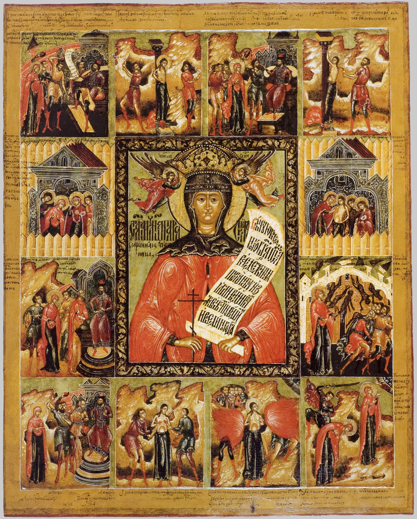 Параскева Пятница, св. вмц. с житием; Россия. Ярославль; XVII в.